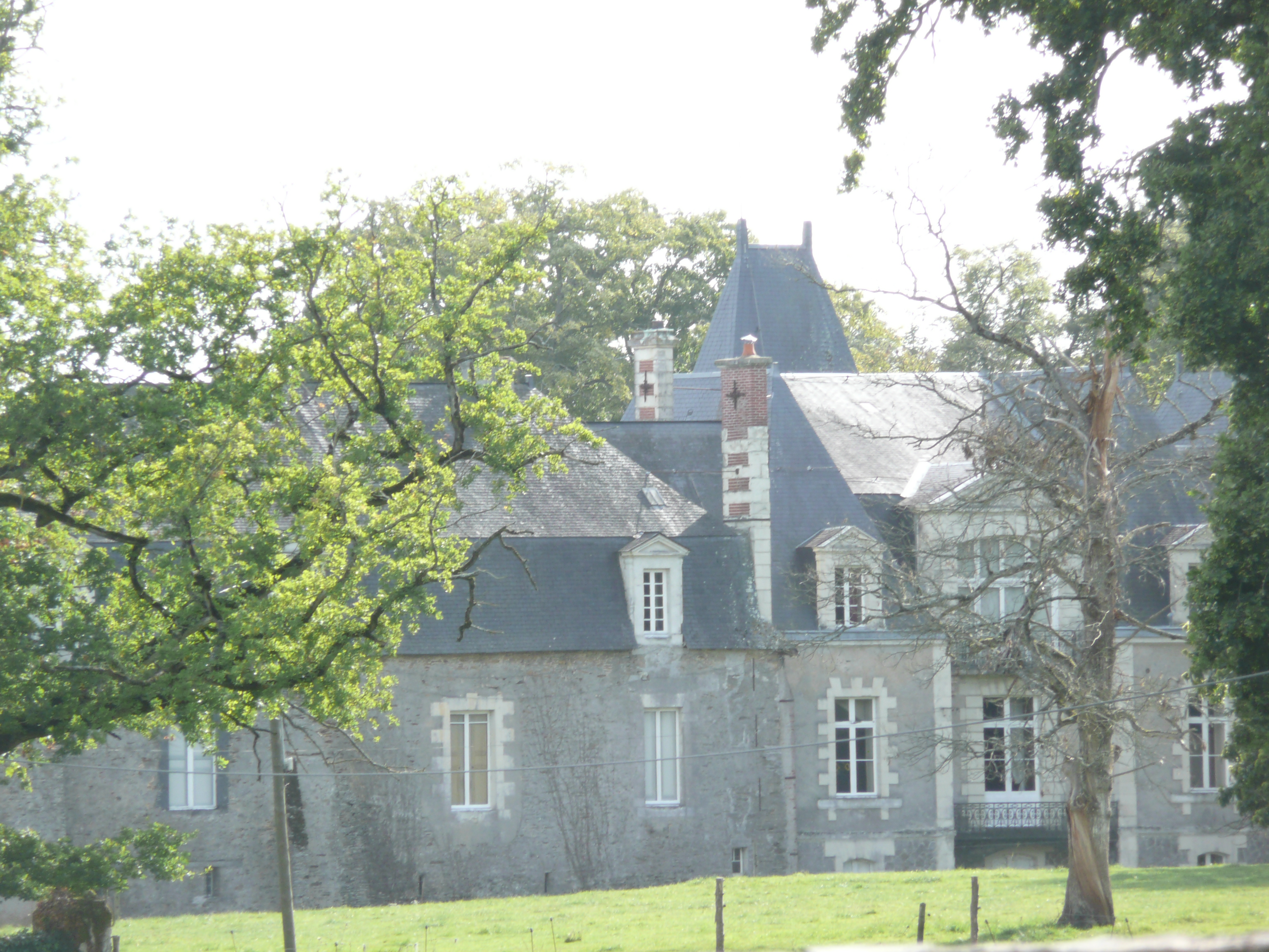 Candé - Propriété du château de La Saulaie